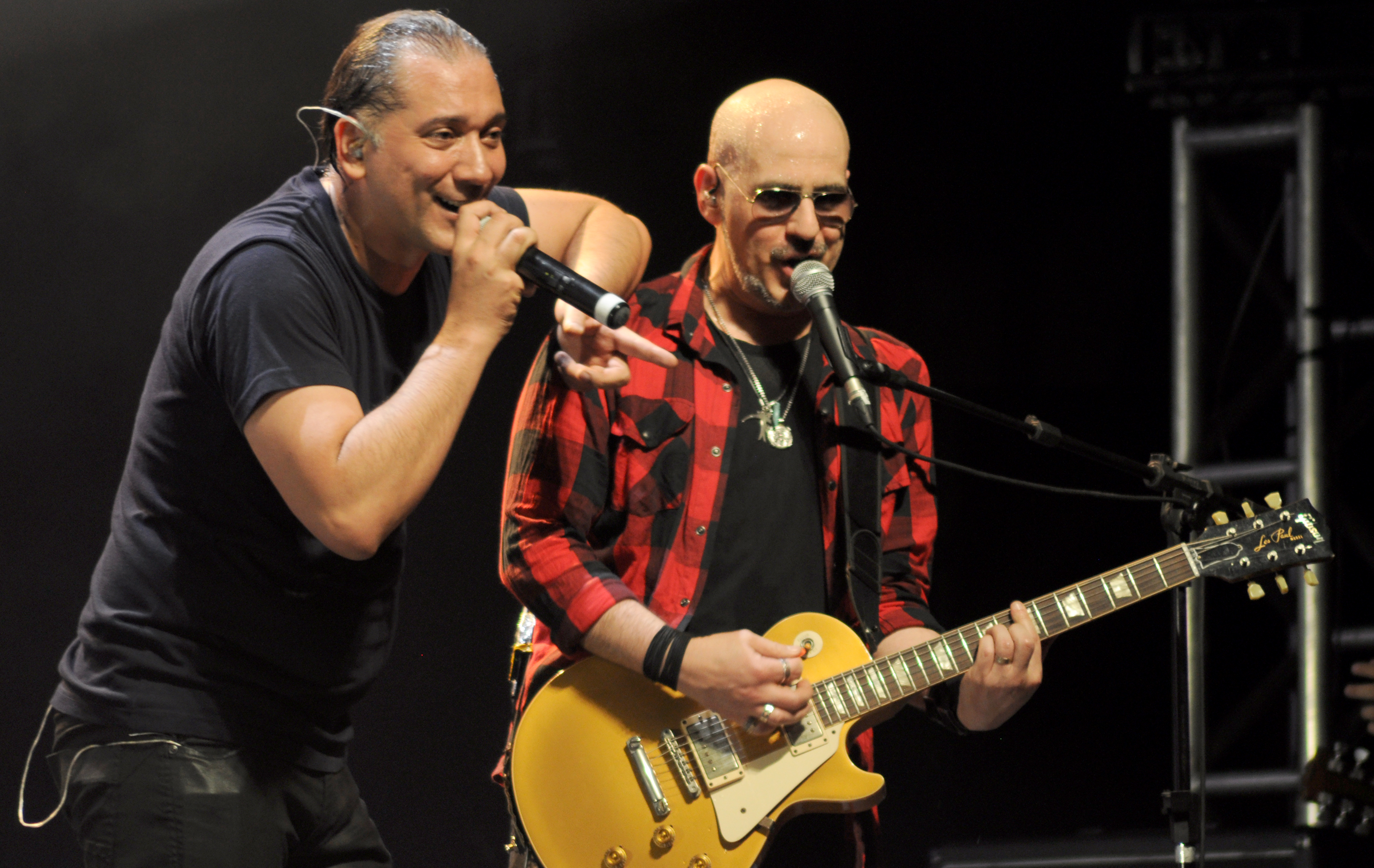 Nenhum de Nós e Biquini Cavadão tocaram no HSBC Brasil, em São Paulo, dia 02 de novembro de 2013. Na palco: Nenhum de Nós - Thedy Corrêa, Veco Marques, Carlos Stein, João Vicenti, Sady Homrich e Estevão Camargo. Biquini Cavadão - Bruno Gouveia, Carlos Coelho, Miguel Flores da Cunha, Álvaro Birita, Marcelo Magal e Walmer Carvalho. (Foto: Rafaela Ely)